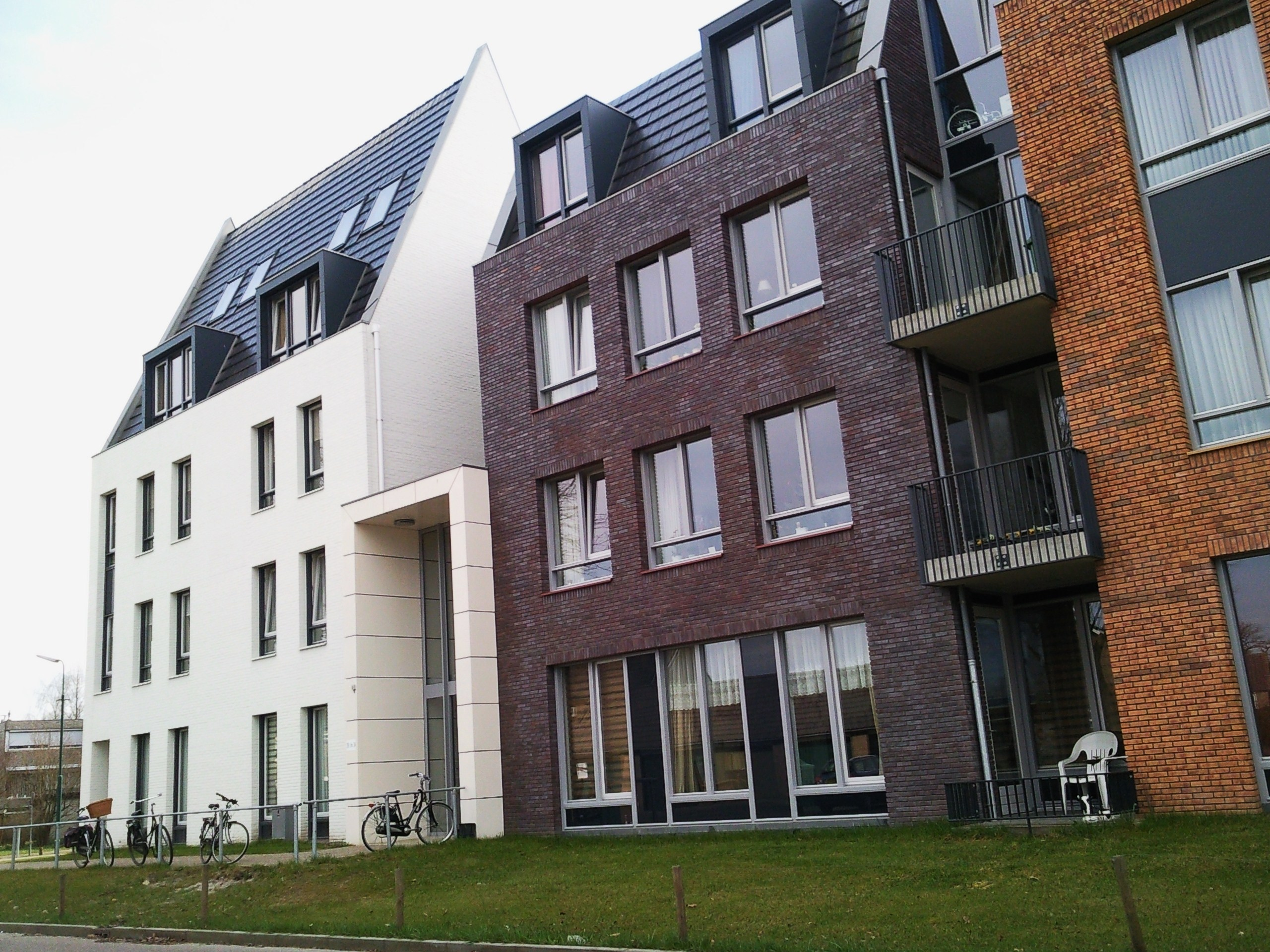 Nieuwbouw in de stad "Leusden". Gelegen vlakbij winkelcentrum de Biezenkamp.